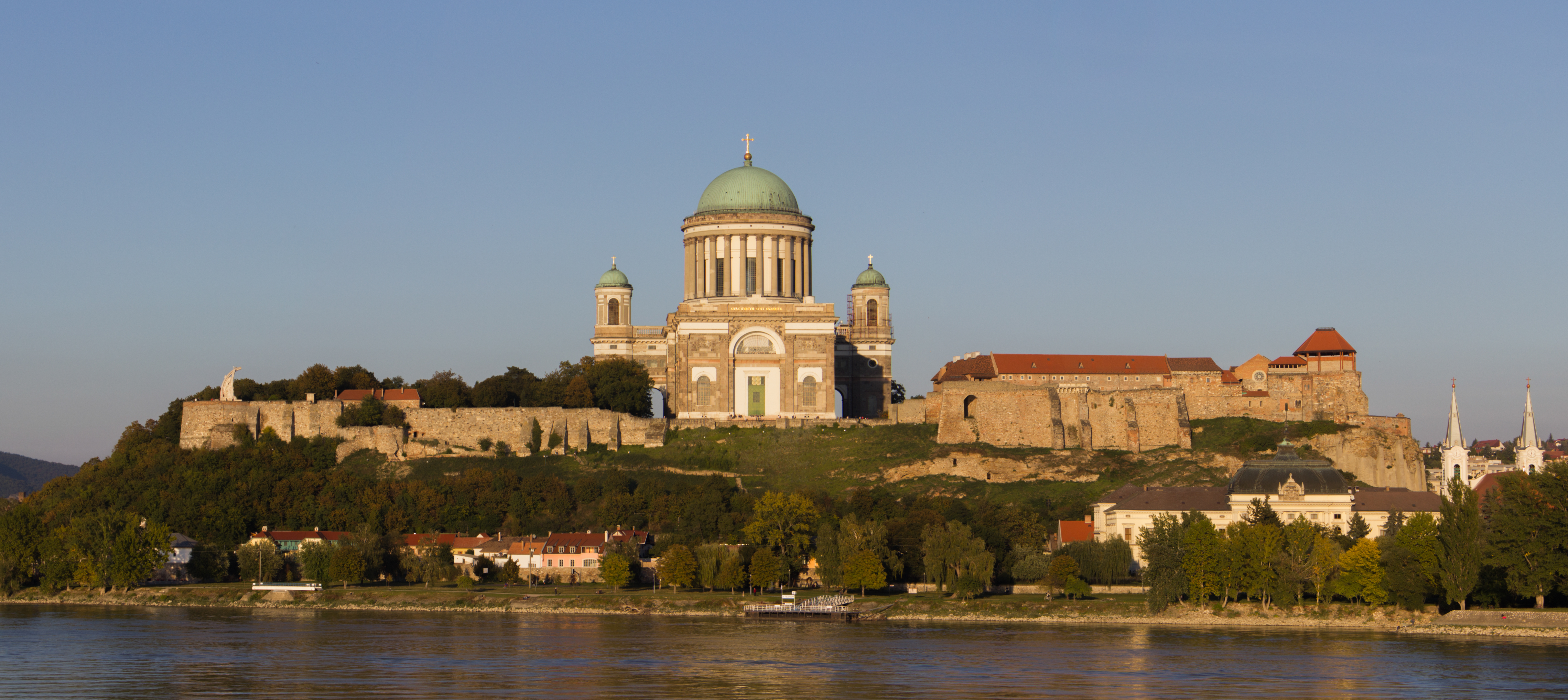 vár, a királyi, majd érseki palota maradványainak együttese This is a photo of a monument in Hungary. Identifier: 91100